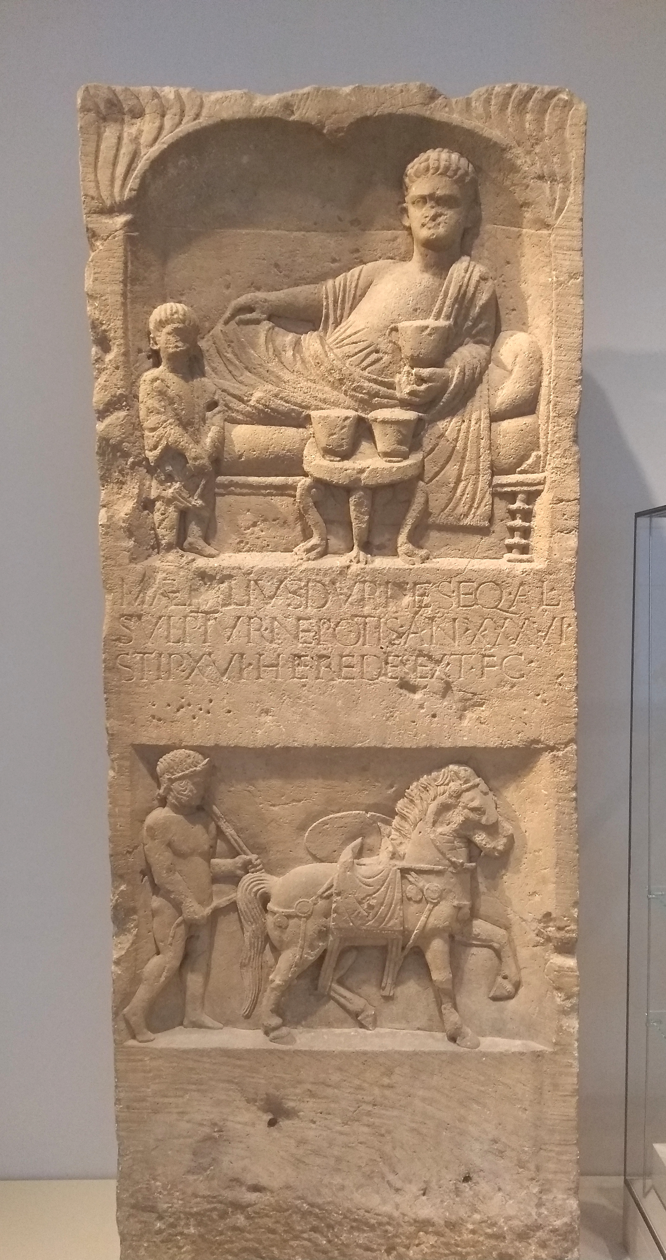 Grabstein des römischen Kavalleriesoldaten Durises (CIL XIII,8311), gefunden in der Gereonstraße in Köln, heute im Rheinischen Landesmuseum Bonn